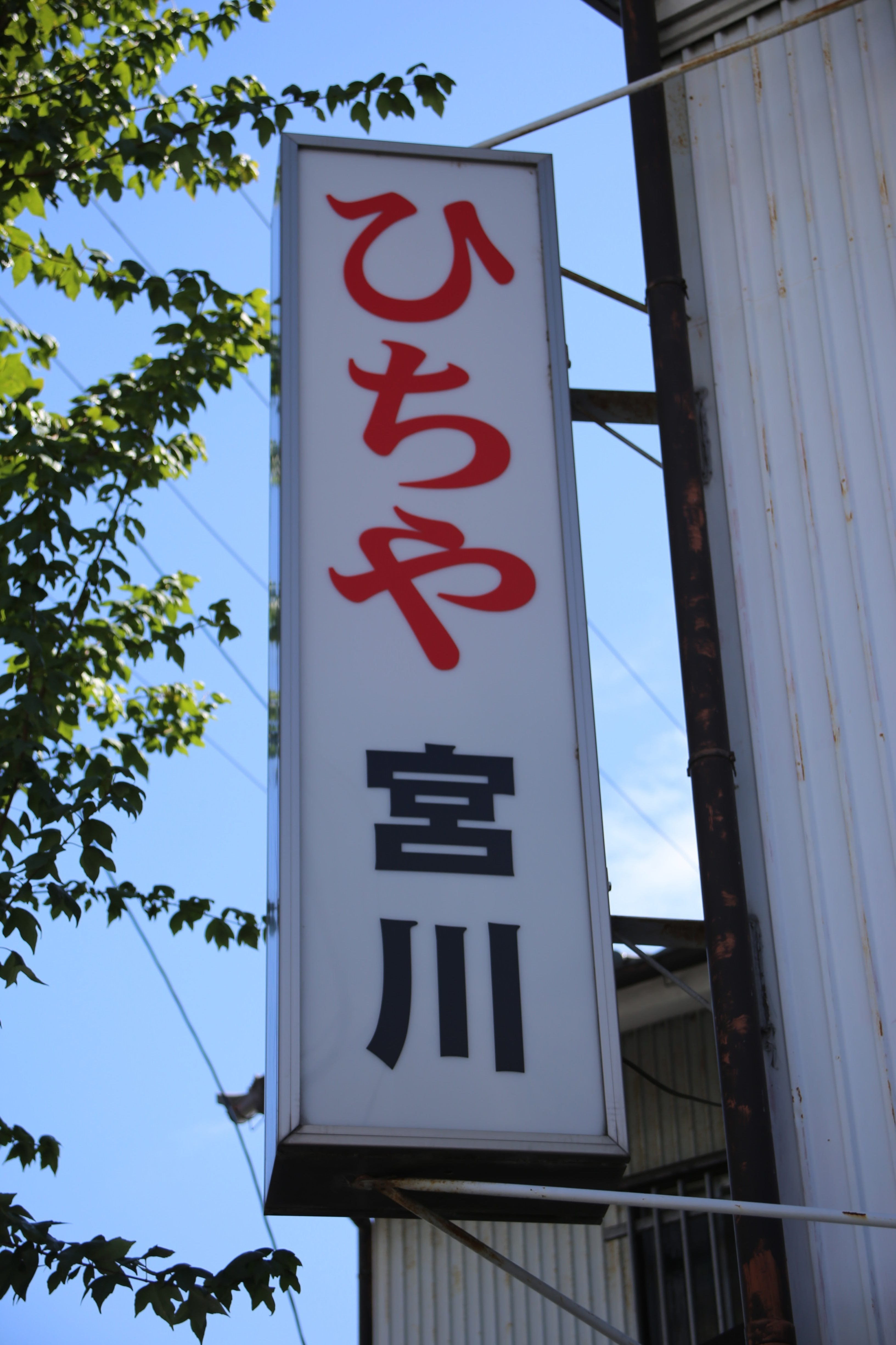 名古屋市西区則武新町の「ひちや宮川」の看板。